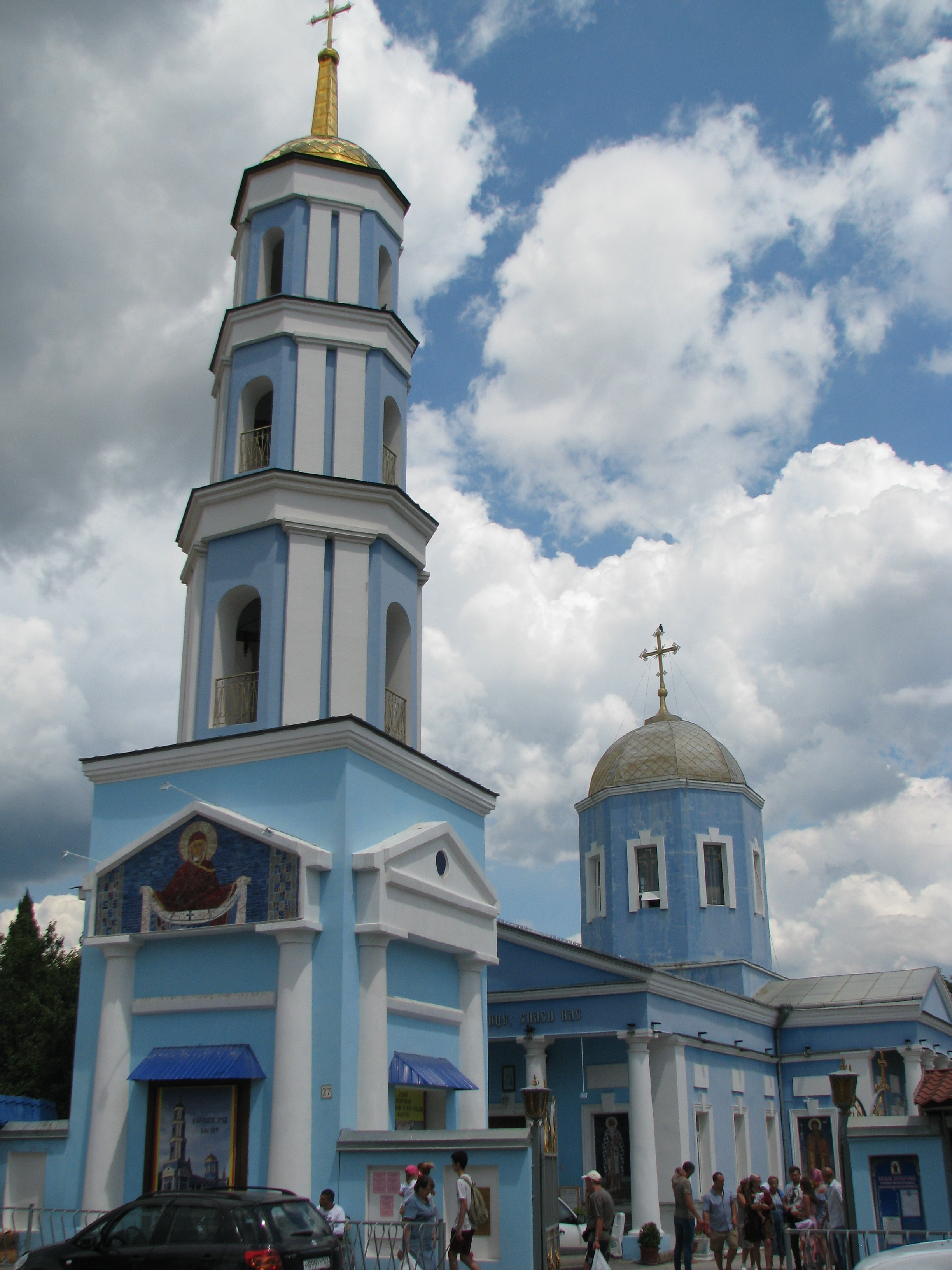 Свято-Покровский храм (Судак)